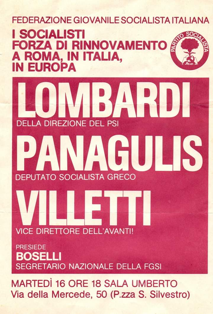 Convegno organizzato dal PSI e FGSI